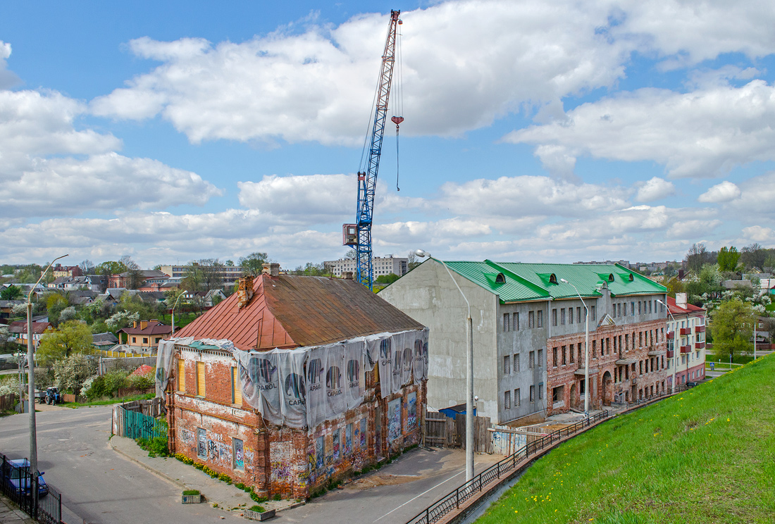 Магілёў. Вуліца Лазарэнкі, 13 і 15